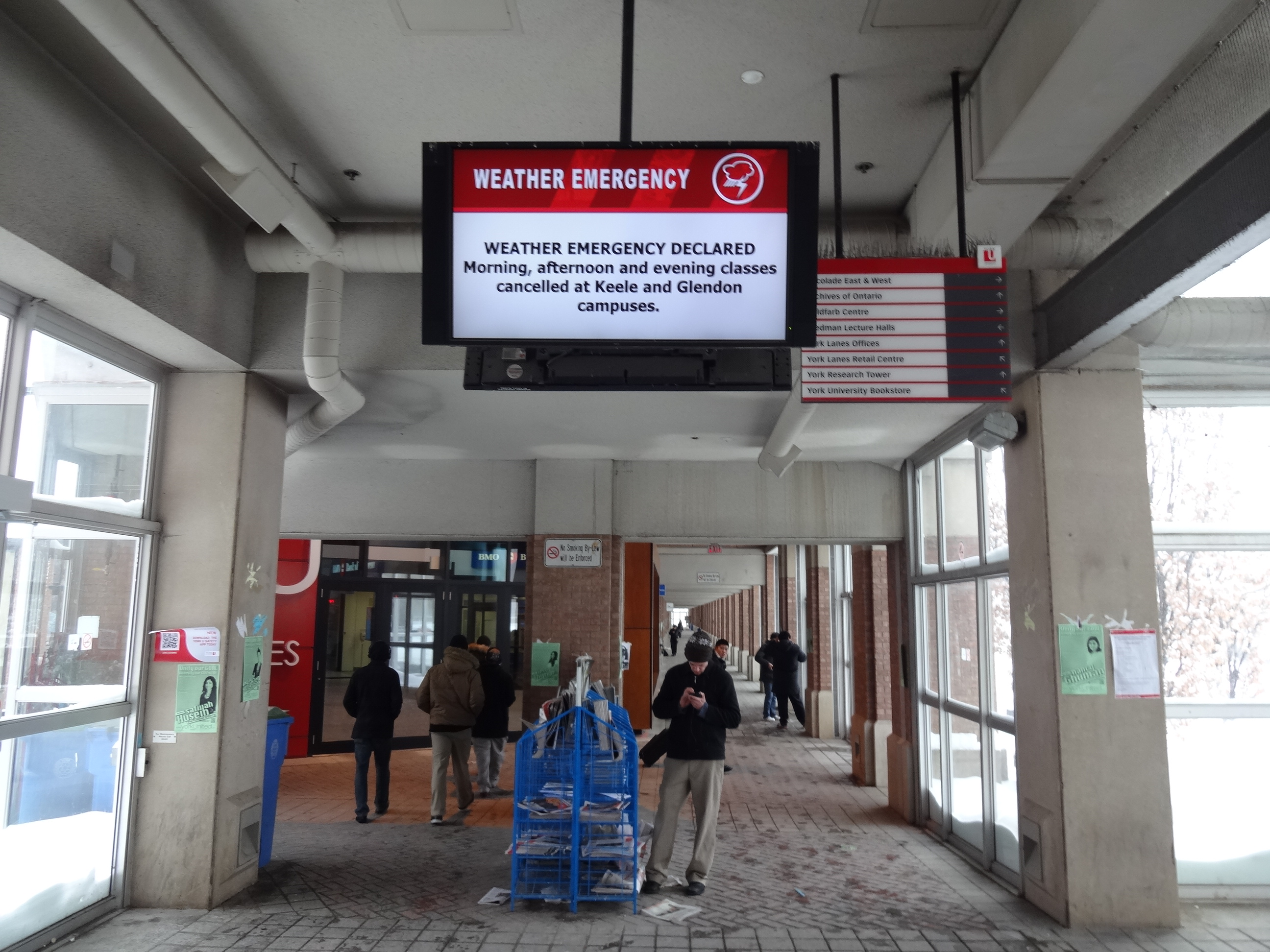 Televisão a noticiar a Tempestade do Cabo Hatteras dentro da York University.